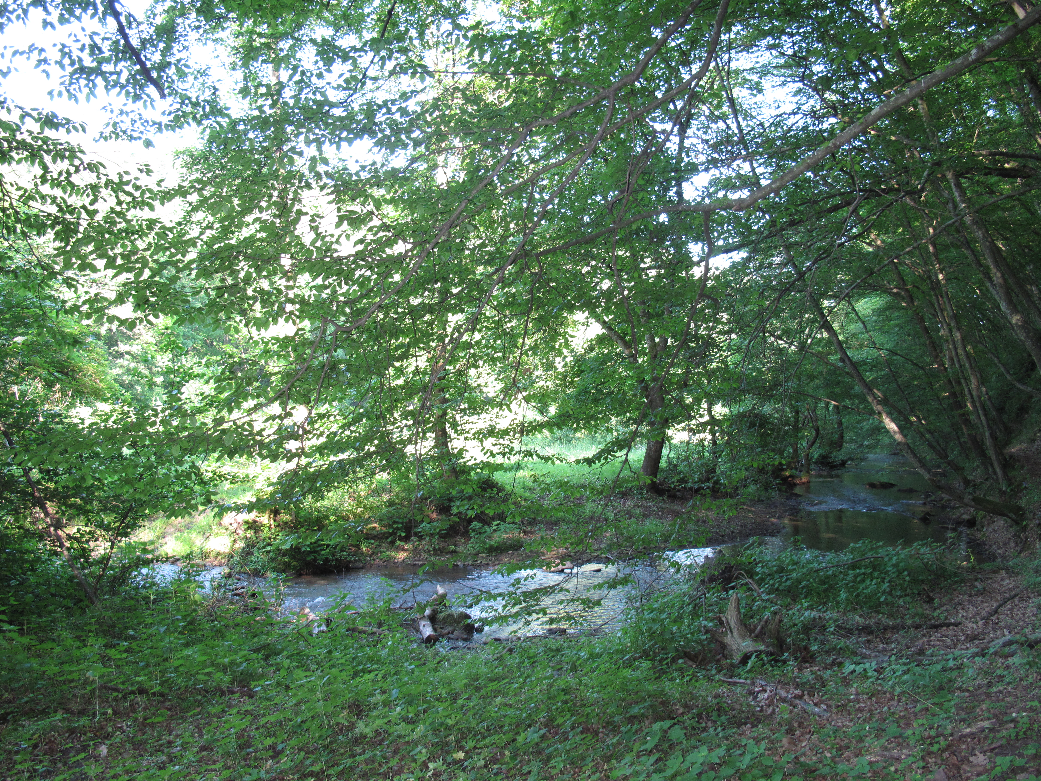 Течія Джурина нижче Червоногородського водоспаду. Територія НПП «Дністровський каньйон».